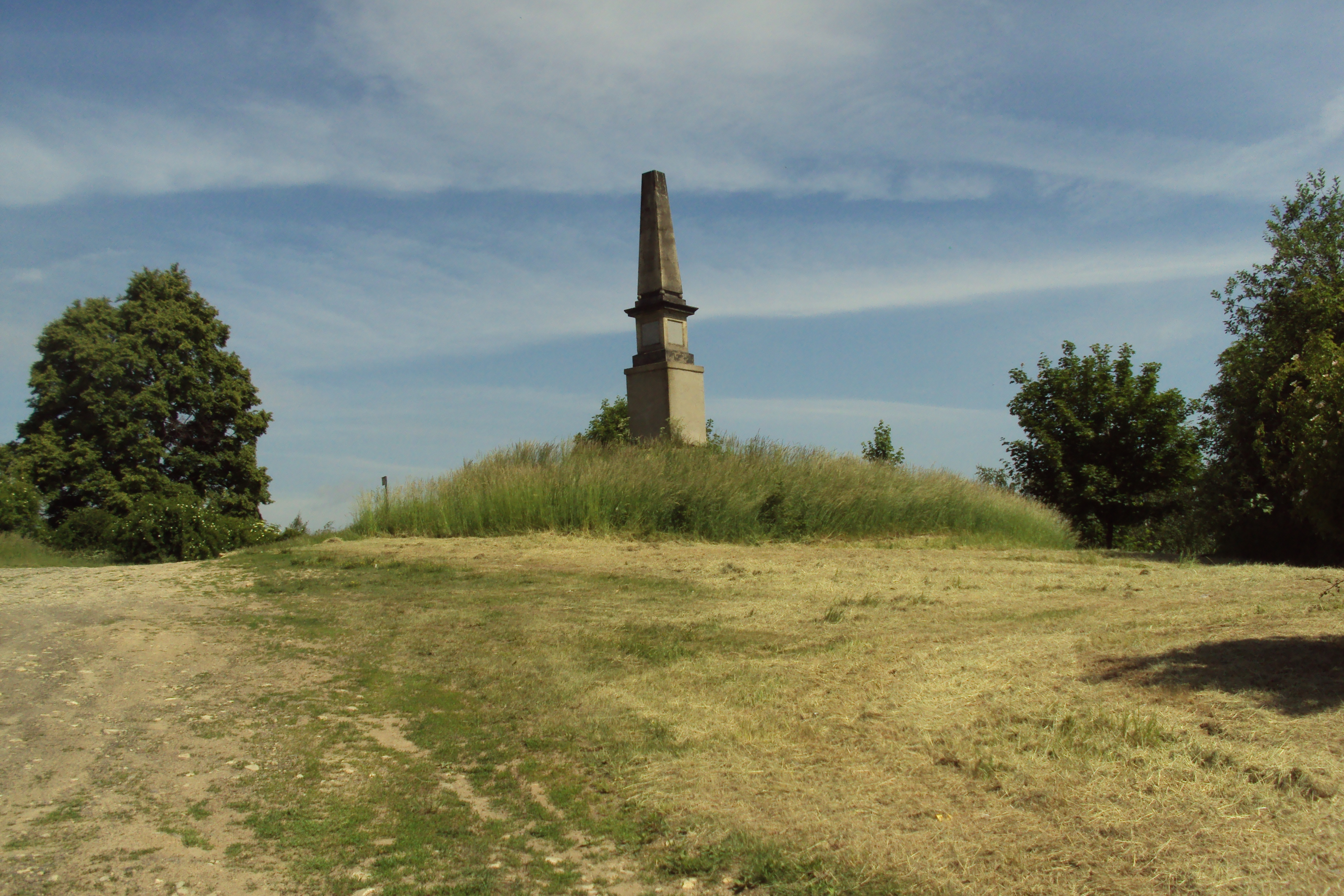 Mohyla na vrchu Ve Chvojkách vysoko nad Teplicemi